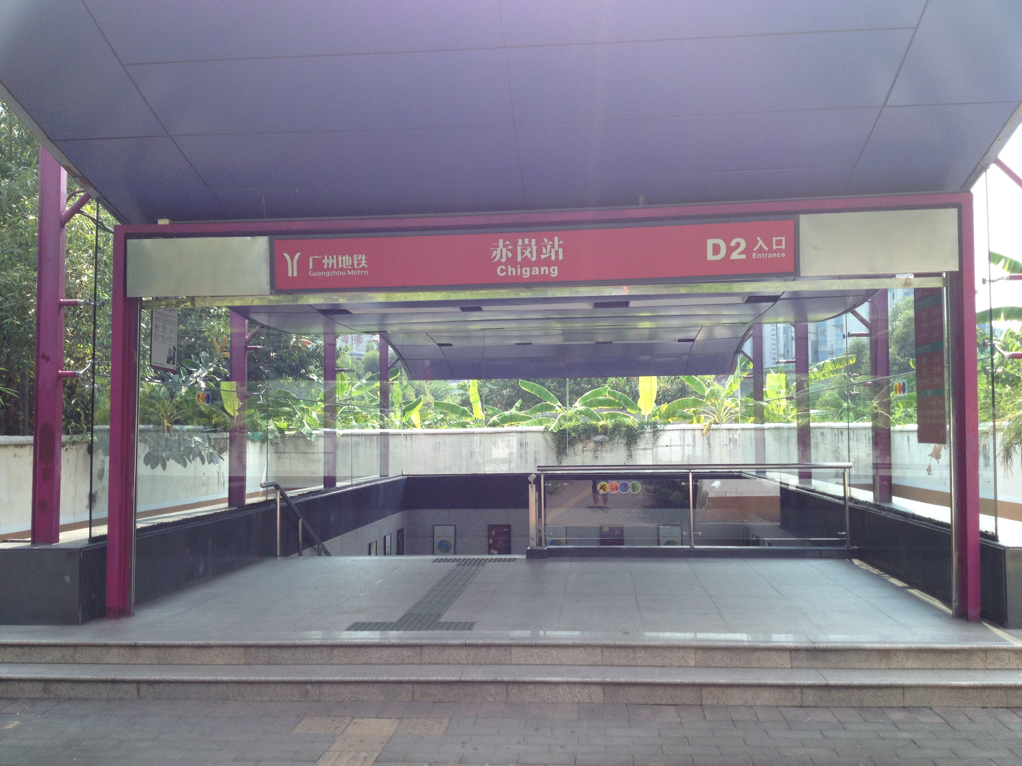 广州地铁赤岗站D2出入口